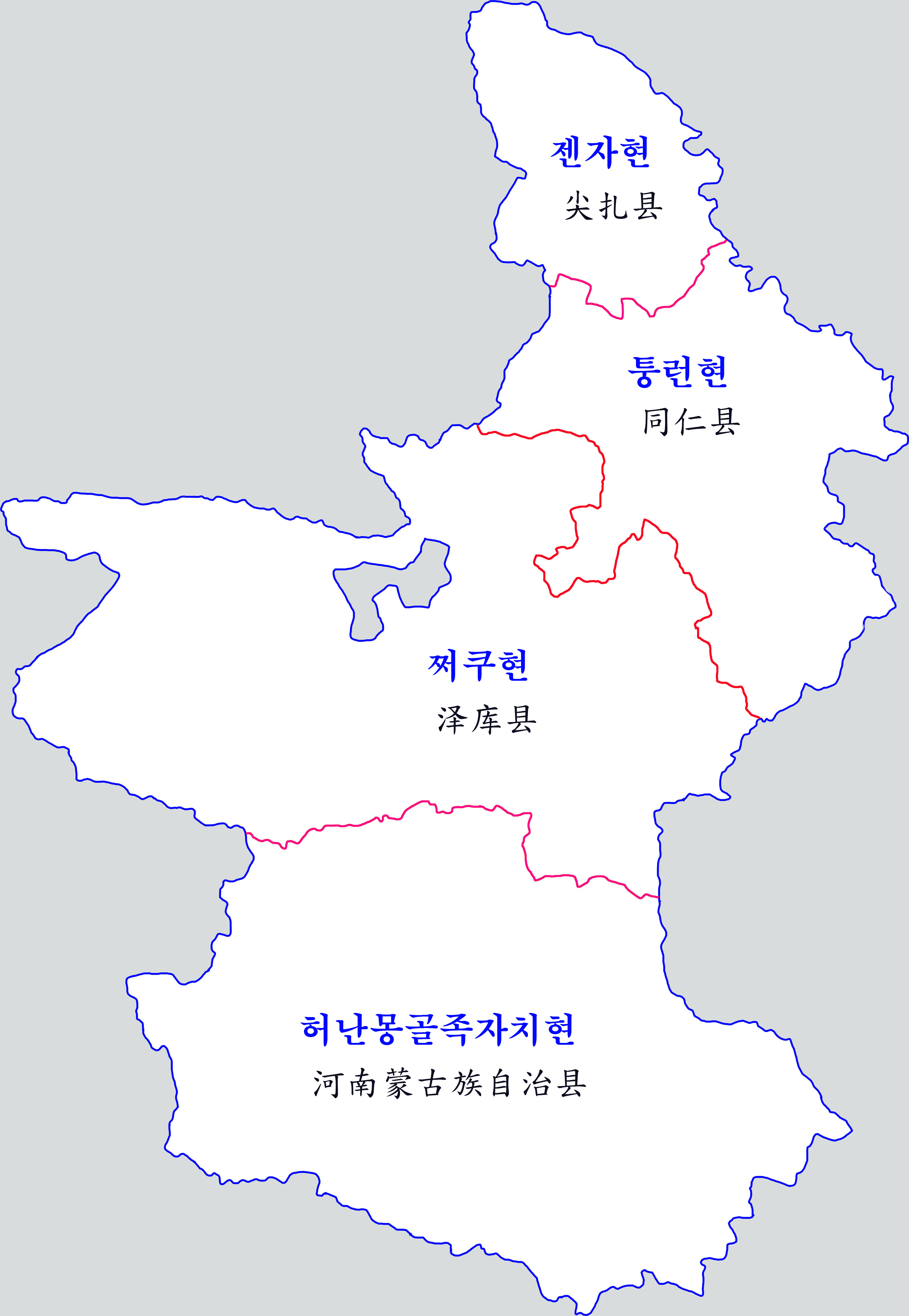 황난티베트자치주 지도